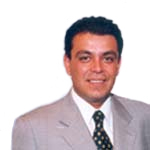 Eduardo Lagos Herrera, político chileno.